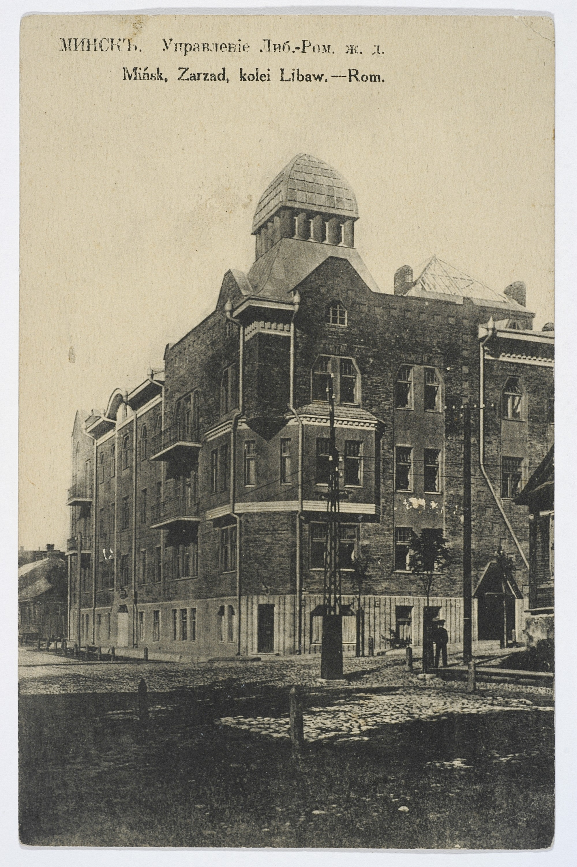 Беларуская (тарашкевіца): Менск (Miensk), вуліца Магазынная (vulica Magazynnaja) каля скрыжаваньня з Лошыцкай (vulica Łošyckaja). Управа Лібава-Роменскай чыгункі